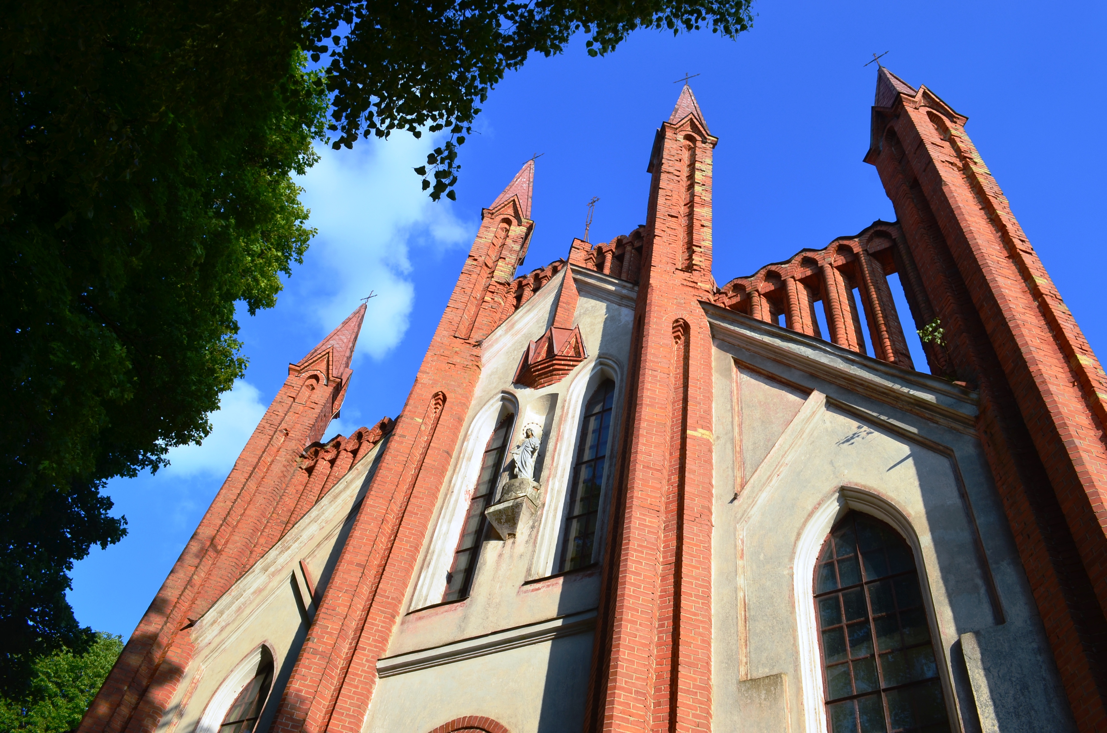 Senųjų Trakų bažnyčios fasadas, Trakų raj.